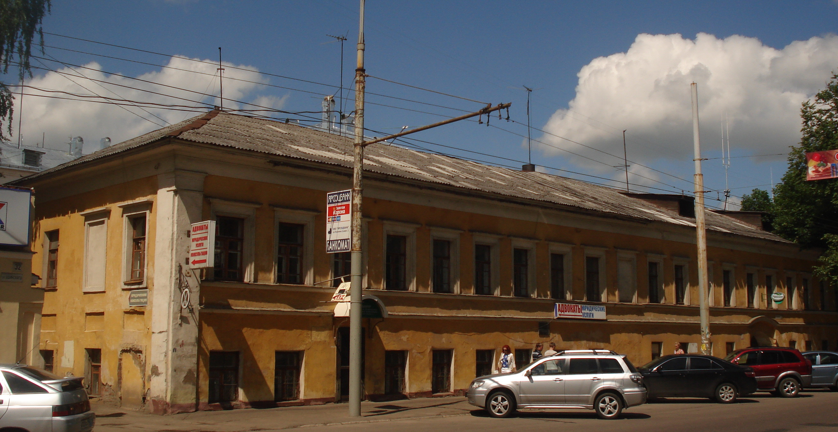 Дом, в котором К. Д. Ушинский жил в Ярославле. Улица Стрелецкая (ныне Ушинского).